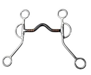 Kandare Stange bewegliche Schenkel (C-Kandare) Western-Kandare. Mit Einschnallmöglichkeit für Trensenzügel (Mittlere Ösen). Ohne Kinnkettenhaken. Kinnkette oder Kinnriemen wird, zusammen mit dem Kopfstück, an den *oberen* Ösen befestigt